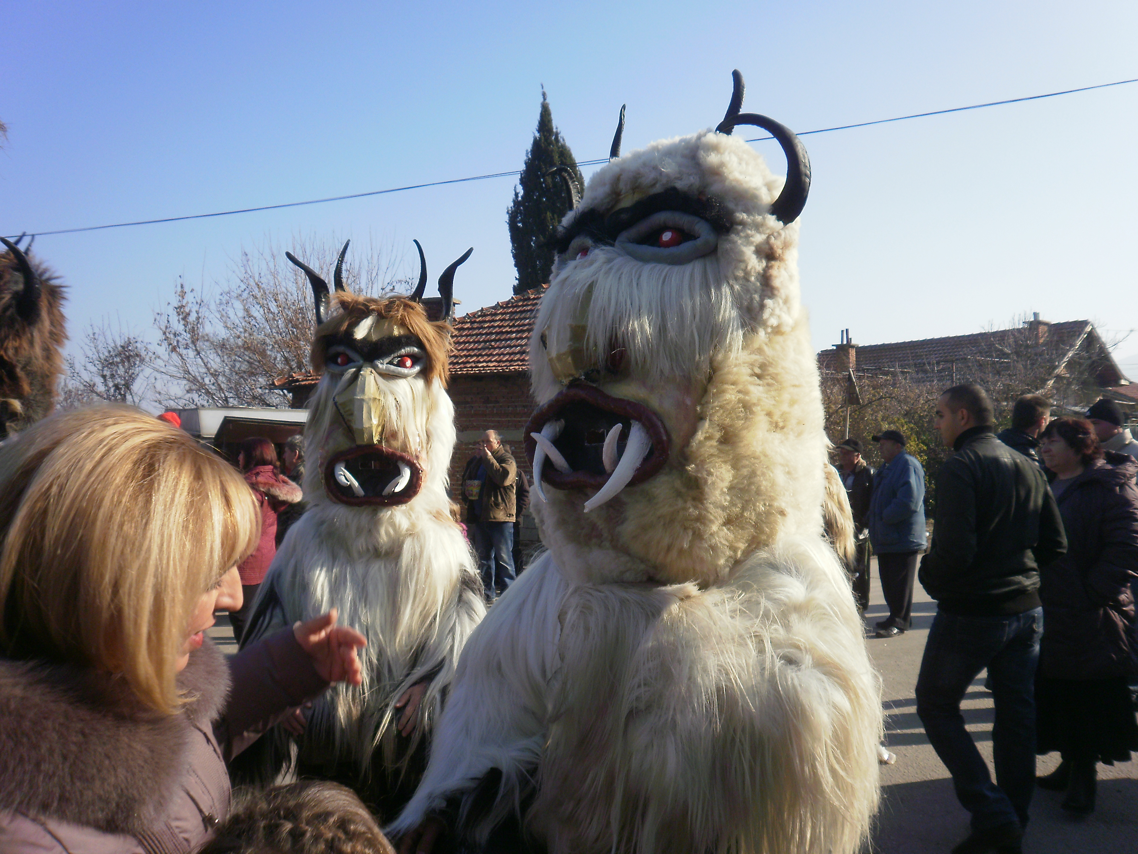 Кукери във Варвара, област Пазарджик, 1 януари 2013 г.